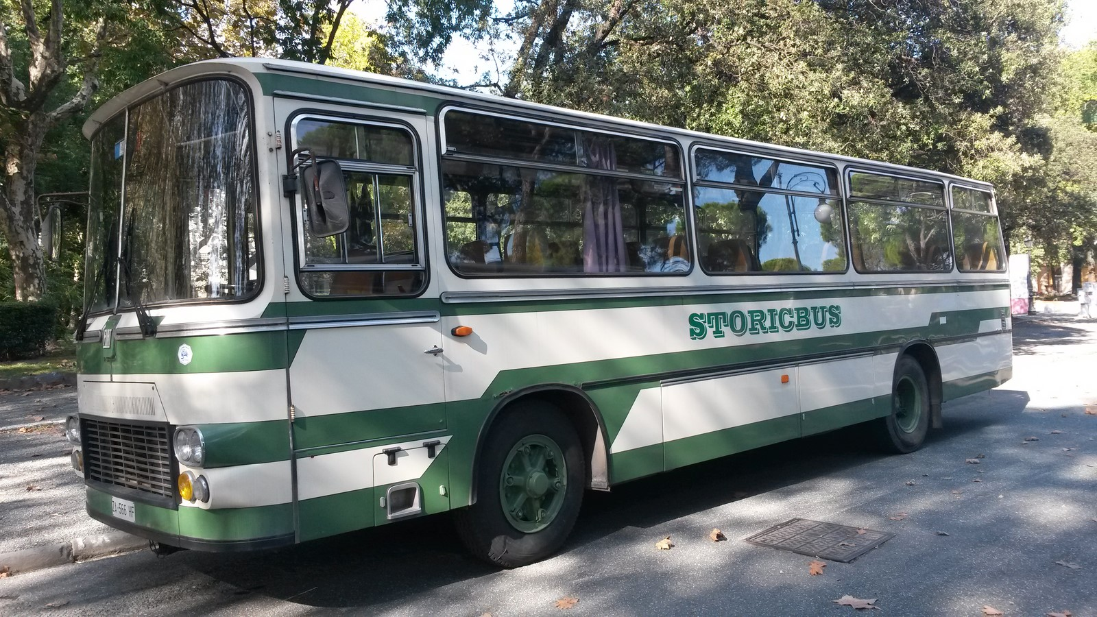 Fiat 308L Dallavia del 1975 n.ro 002 interurbano preservato da Storicbus-Museo dell'Autobus Italiano